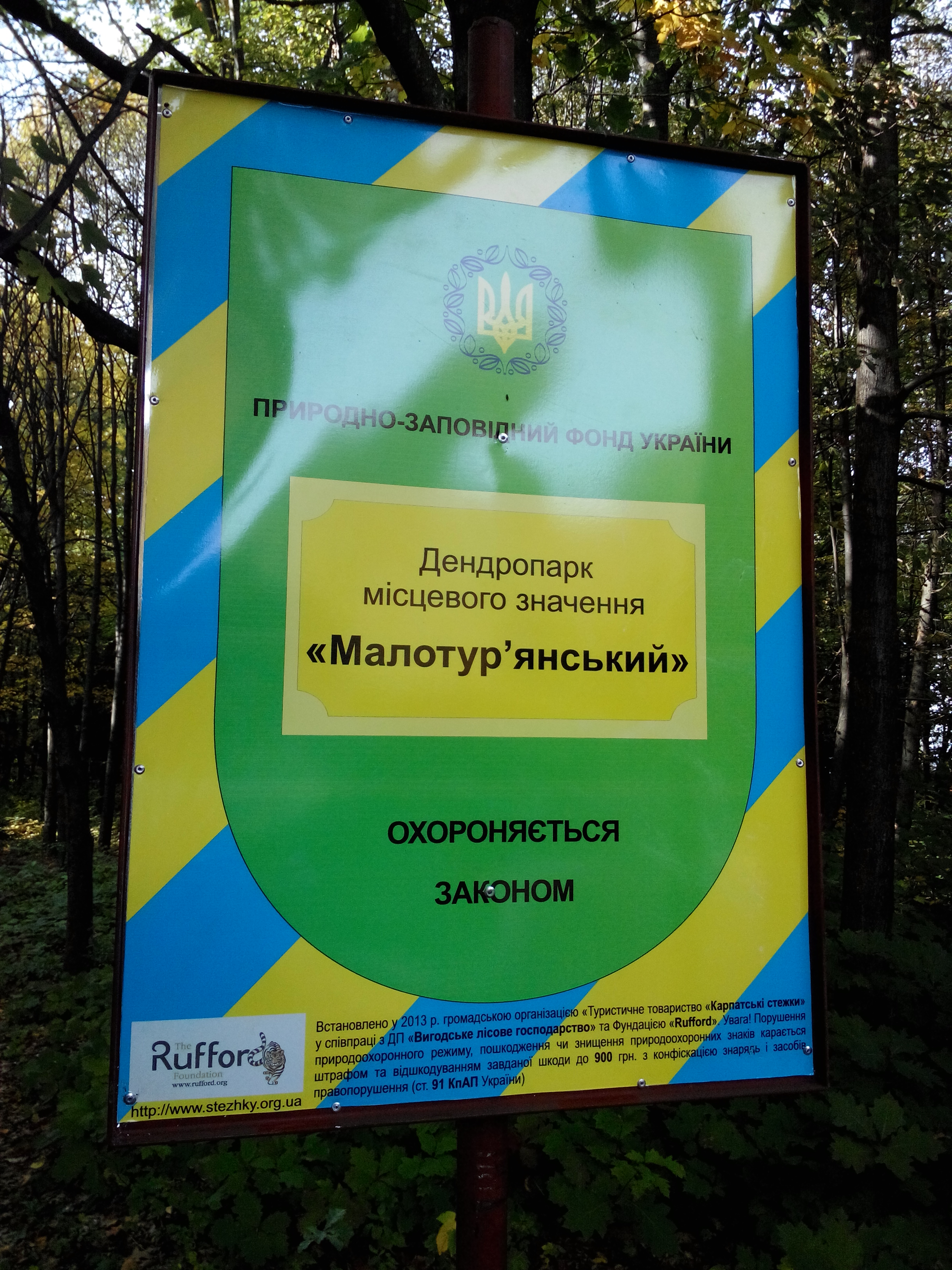 Охоронний аншлаг2